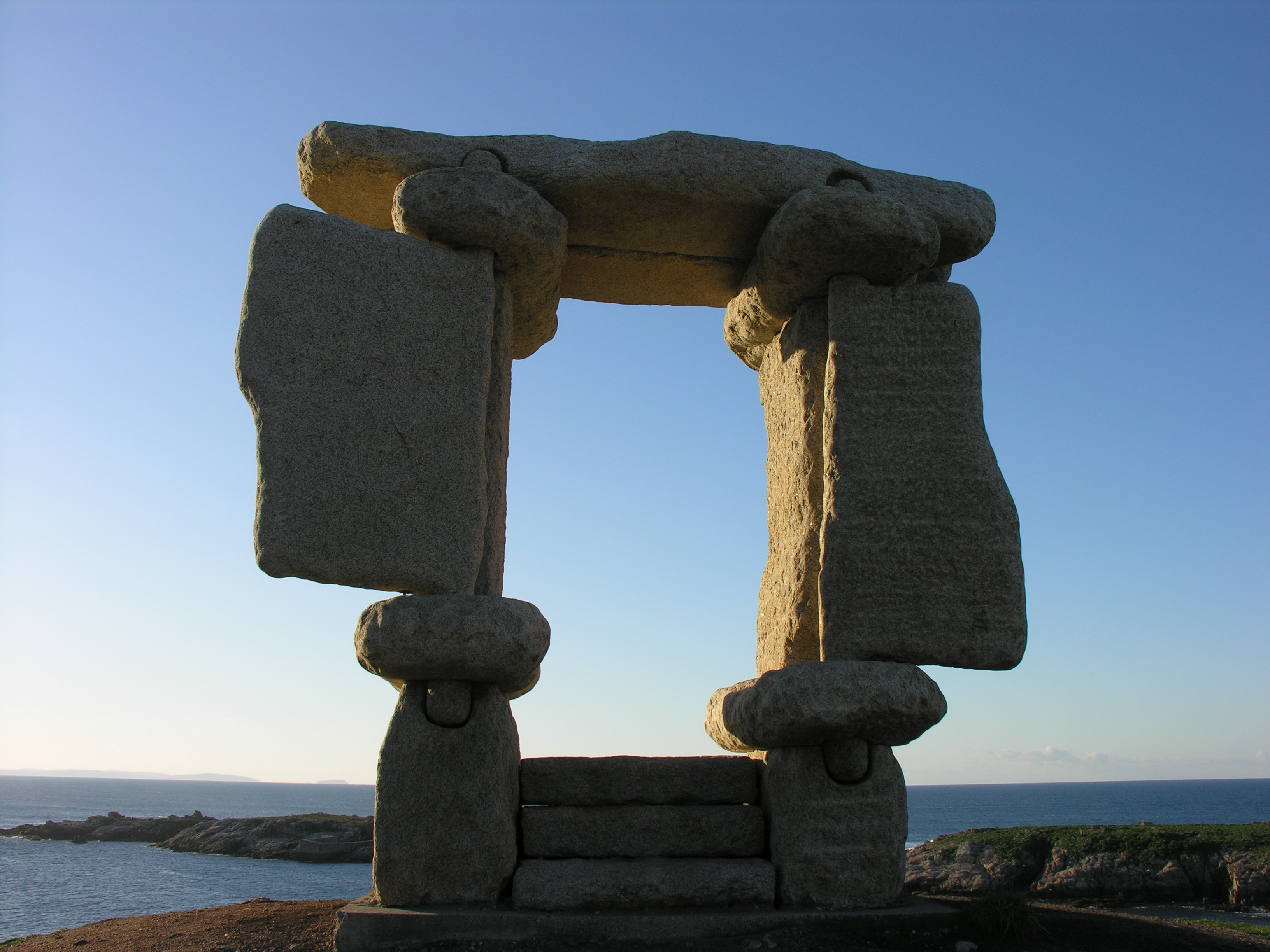 A Coruña